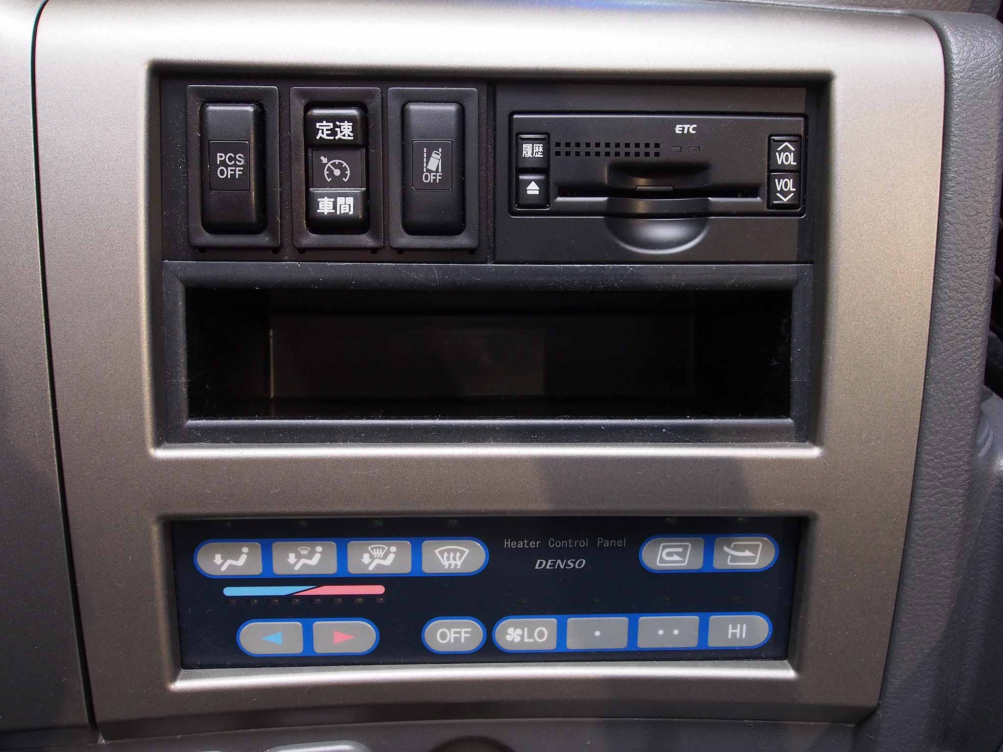 2代目日野・セレガのダッシュボード右端にある、運転席ヒーターコントロールパネルとETC車載器、およびスイッチ類。 PCS解除スイッチ スキャニングクルーズのマスタースイッチ兼動作モード切り替え 定速モード 車間モード 車線逸脱警報解除